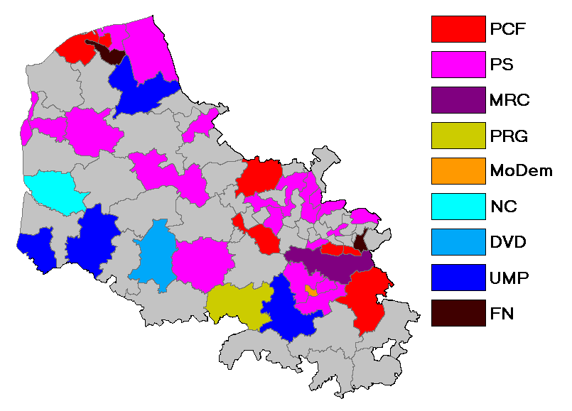 Carte du parti en tête, cantonales 2011, Pas-de-Calais